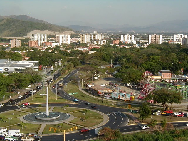 redoma de san jacinto